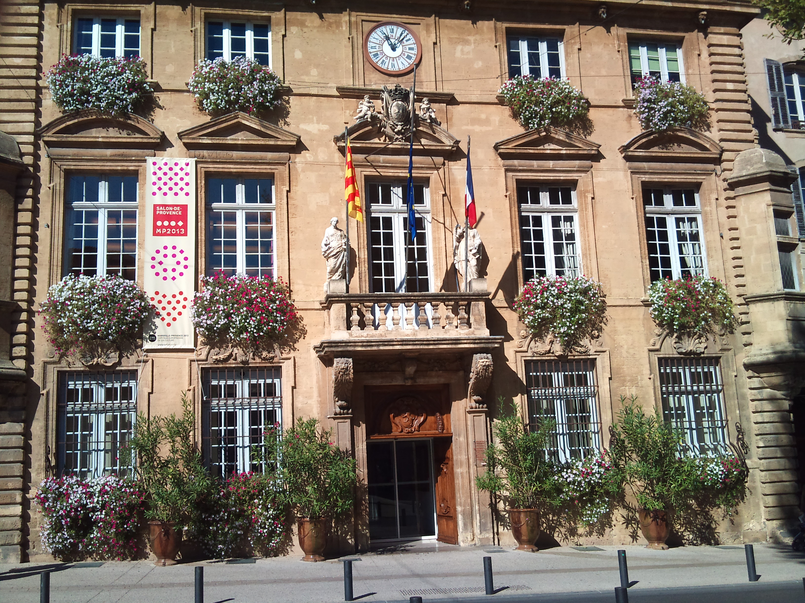 Photo prise en 2012